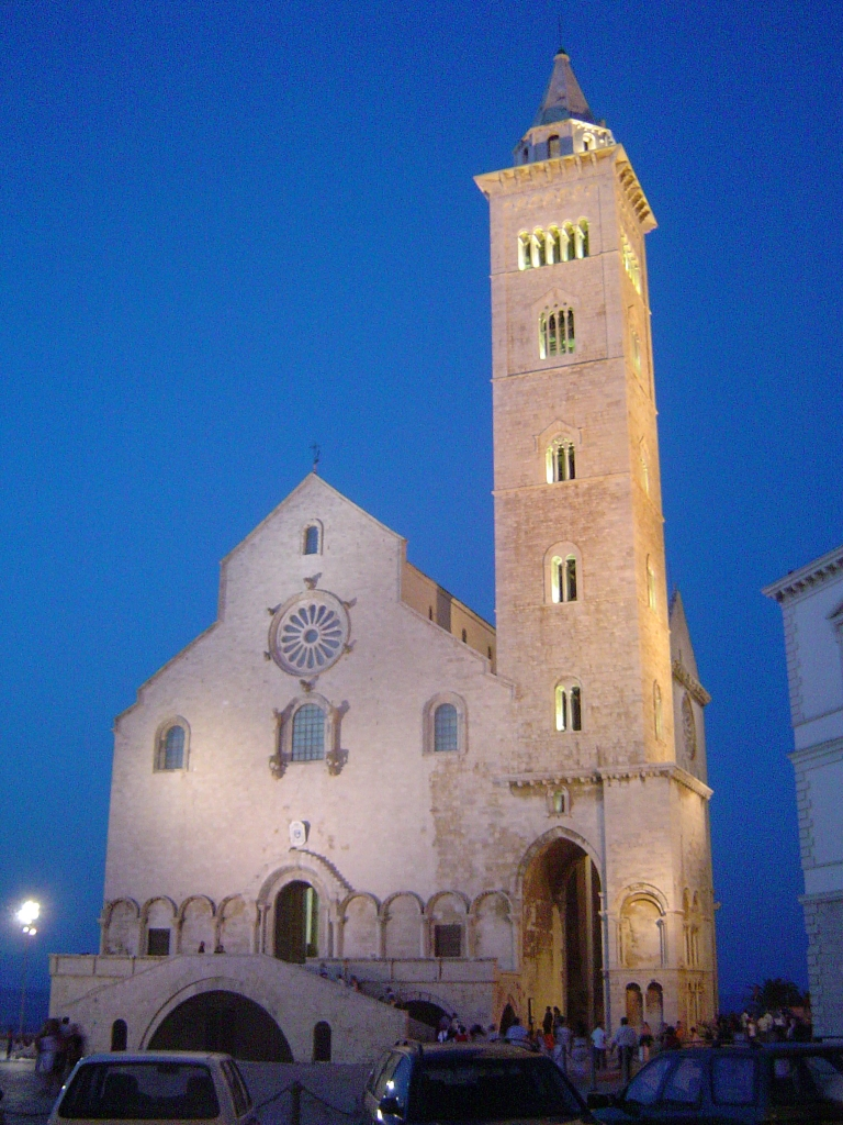 Cattedrale di Trani (BA), Italy